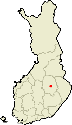 Own work